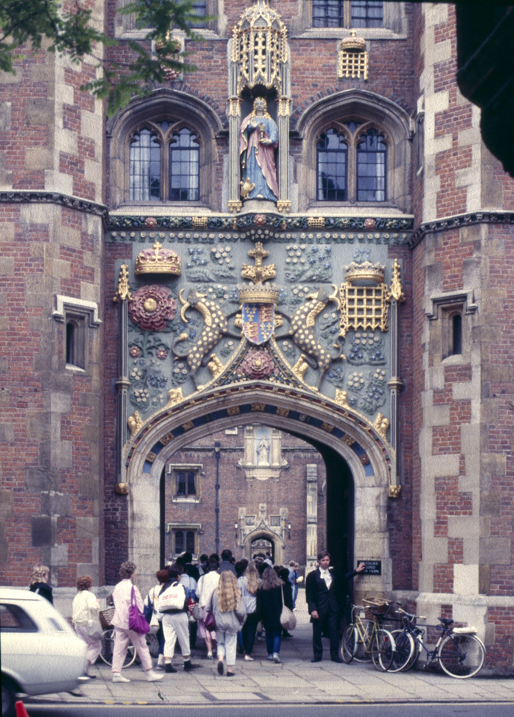 1985 in Cambridge